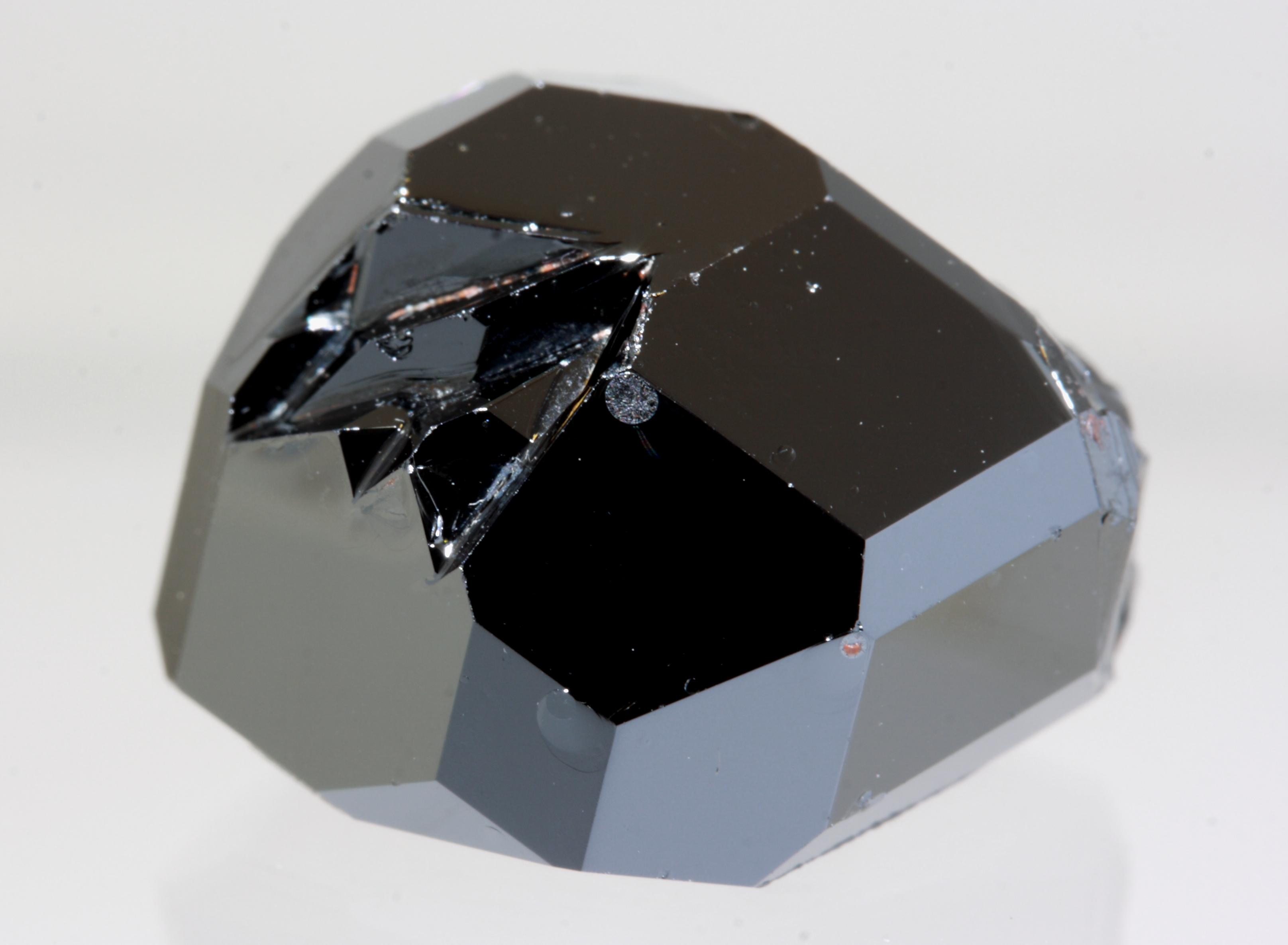 Bild eines synthetischen Yttriumeisengranats Einkristall mit roten Resten des Lösemittels